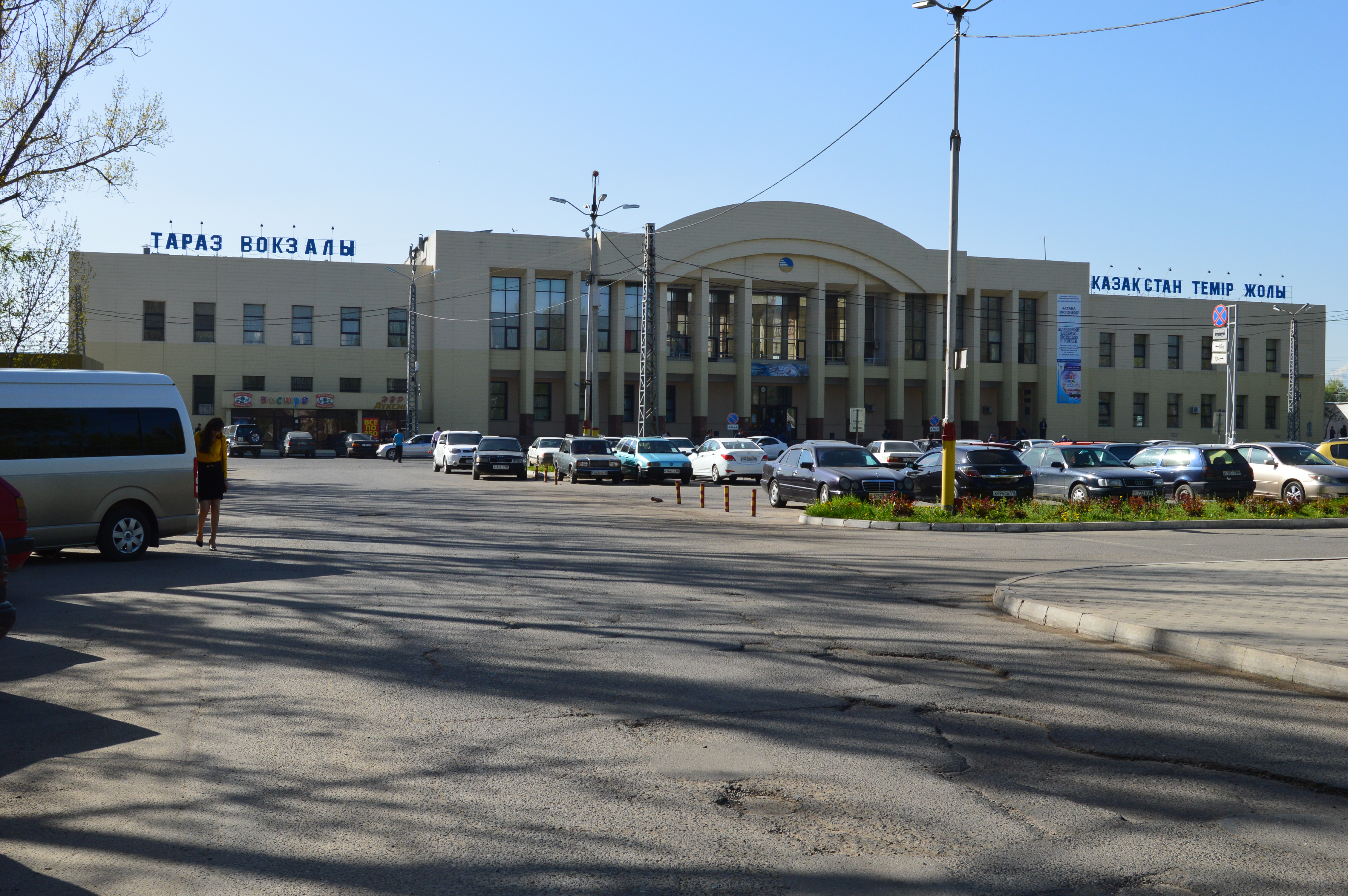 Здание железнодорожного вокзала в городе Тараз,Казахстан